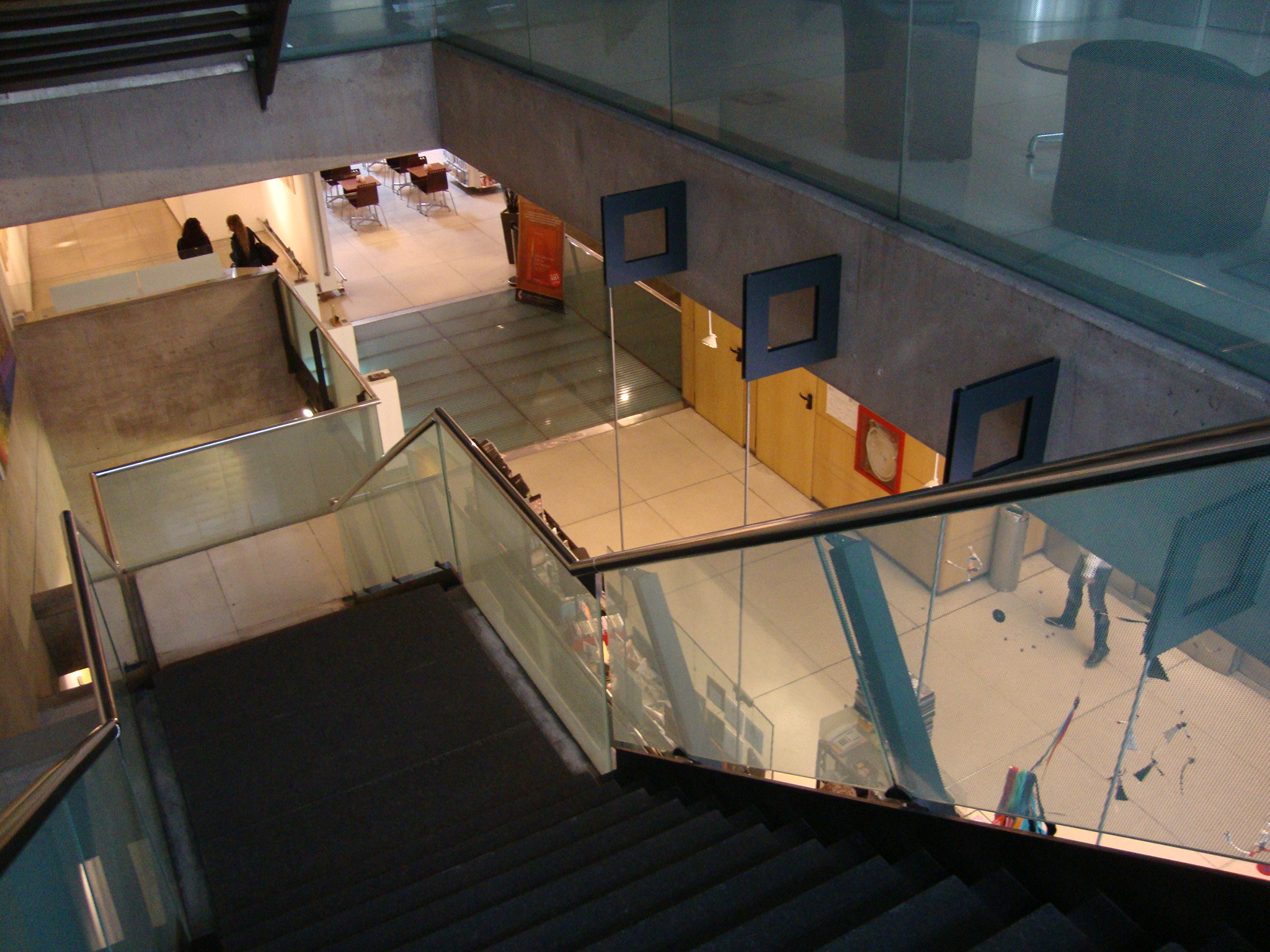 Centro Cultural de Cooperación "Floreal Gorini". Buenos Aires, Argentina.